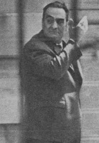 Gral. Antonio Francese (1899-1979), militar y político uruguayo. Extraído de "Siete Días Ilustrados", edición del 25 de enero de 1971 en la que cubre los acontecimientos políticos ocurridos en el vecino país. La fotografía fue tomada en ocasión de la renuncia de Francese al Ministerio de Interior durante el mandato del presidente Pacheco Areco. Dominio público por caducidad de los derechos de autor en Argentina. Ley 11723, art. 34.